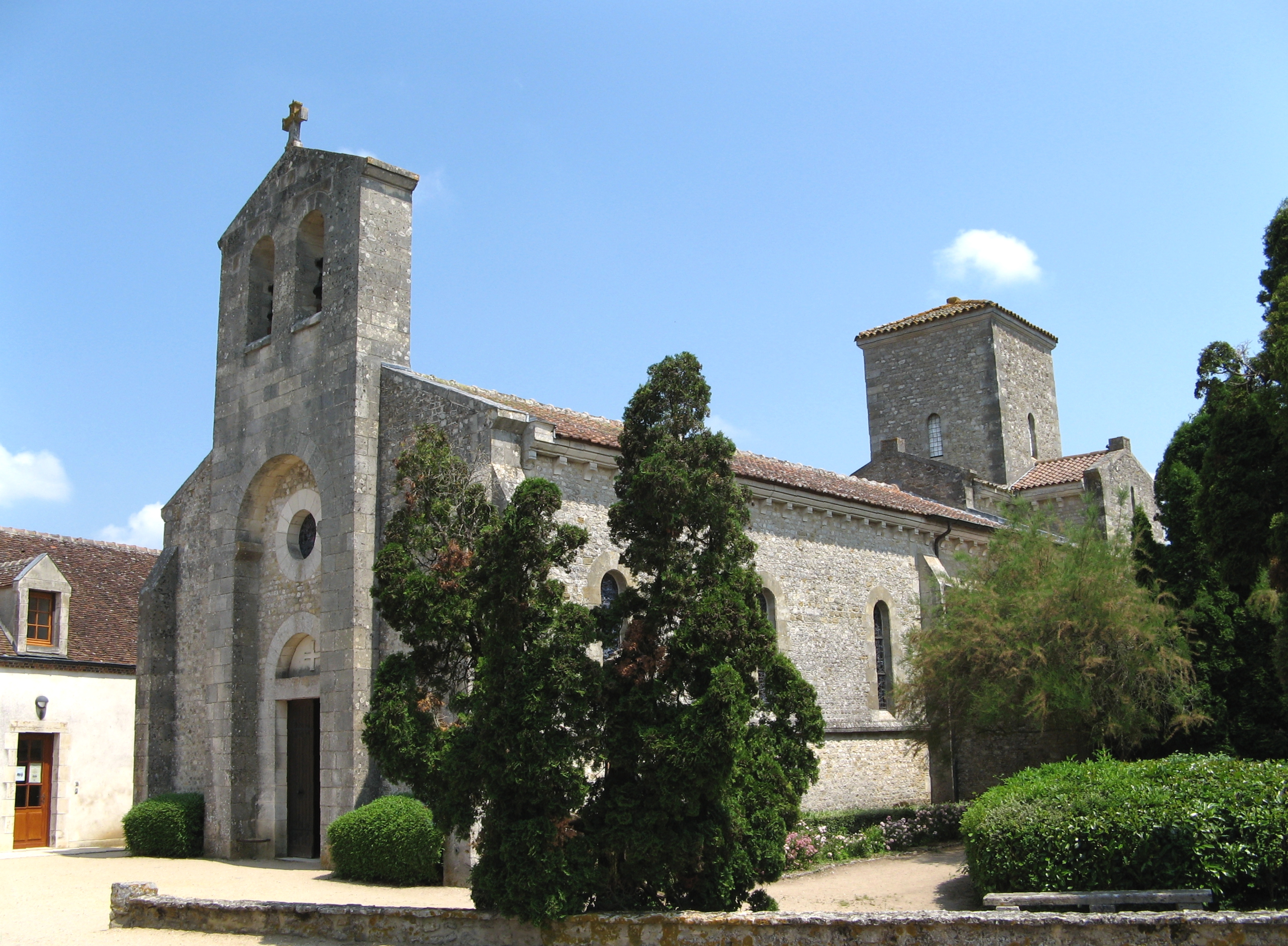 Germigny-des-Prés, Loiret, Centre - Kerk van de Heilige Drievuldigheid, begin IX de eeuw. Oorspronkelijk huiskapel (oratorium). Karolingische stijl. Pre-romaans.